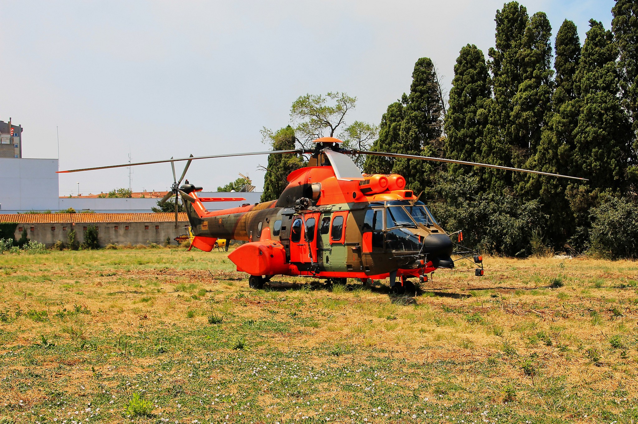 Ayer en un campo próximo a la base de operaciones contra el incendio que está arrasando el Empordà pude ver este helicóptero militar estacionado del que salieron unos 14 militares. En total hay más de 1500 personas entre policías, militares, bomberos y voluntarios que están ayudando a extinguir este desastre que ha provocado una colilla mal apagada. Se comenta que en el lugar donde empezó el fuego encontraron centenares de colillas... ¡Gracias por esa gran faena que hacéis contra este incendio! P.D: El helicóptero es un Eurocopter AS-532AL Cougar ET-670 . ¡Gracias Escursso por el dato!